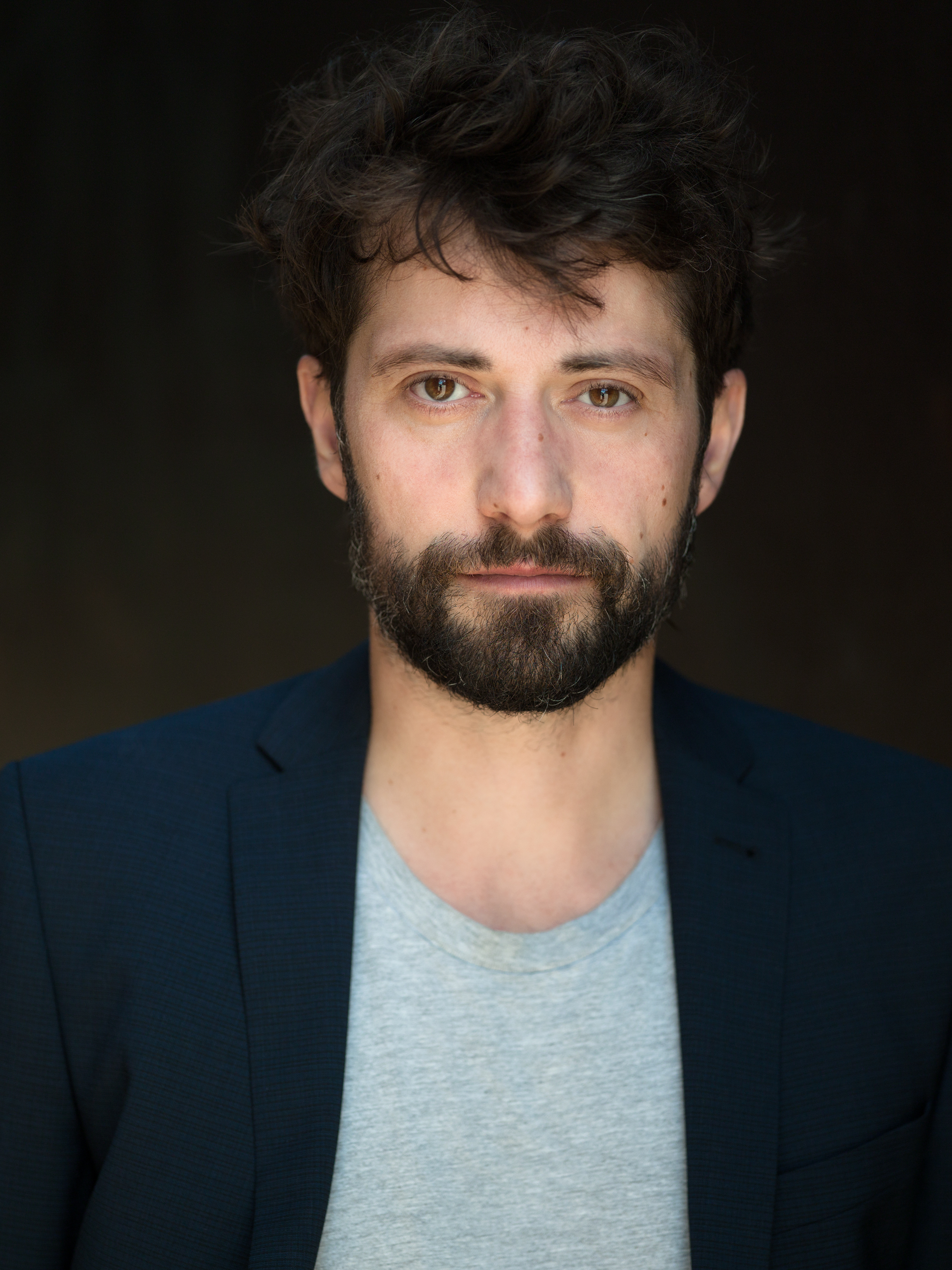 Rom 2016